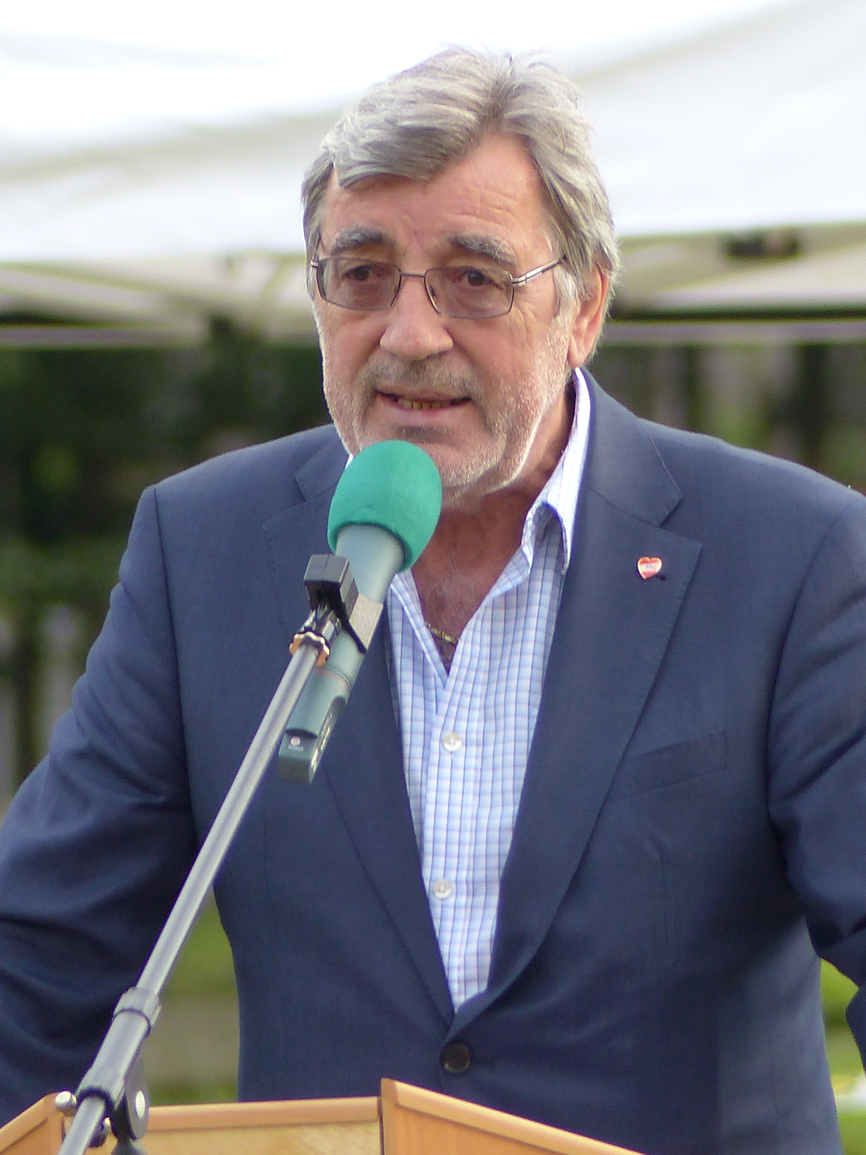 Hans Niessl während einer Ansprache beim Bezirksleistungsbewerb der Feuerwehrjugend in Kleinmürbisch